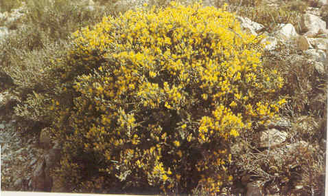 Foto en primavera, de un Cambrón (asiento de pastor) en Torrecuadrada de los Valles. Foto propia.